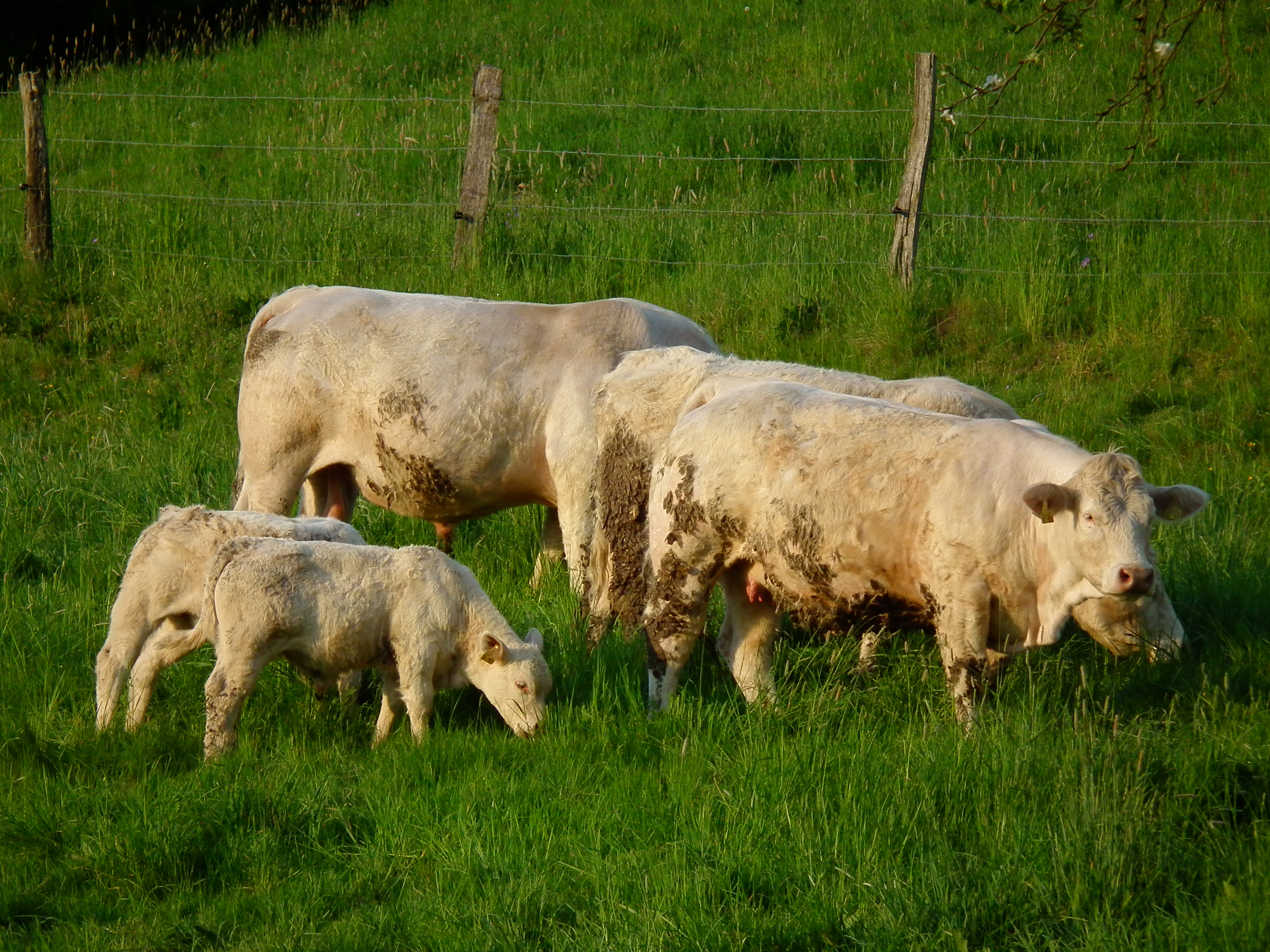 Charolais auf einer Weide in der Nähe von Linnenbach im Kreis Bergstraße (Hessen, Deutschland)